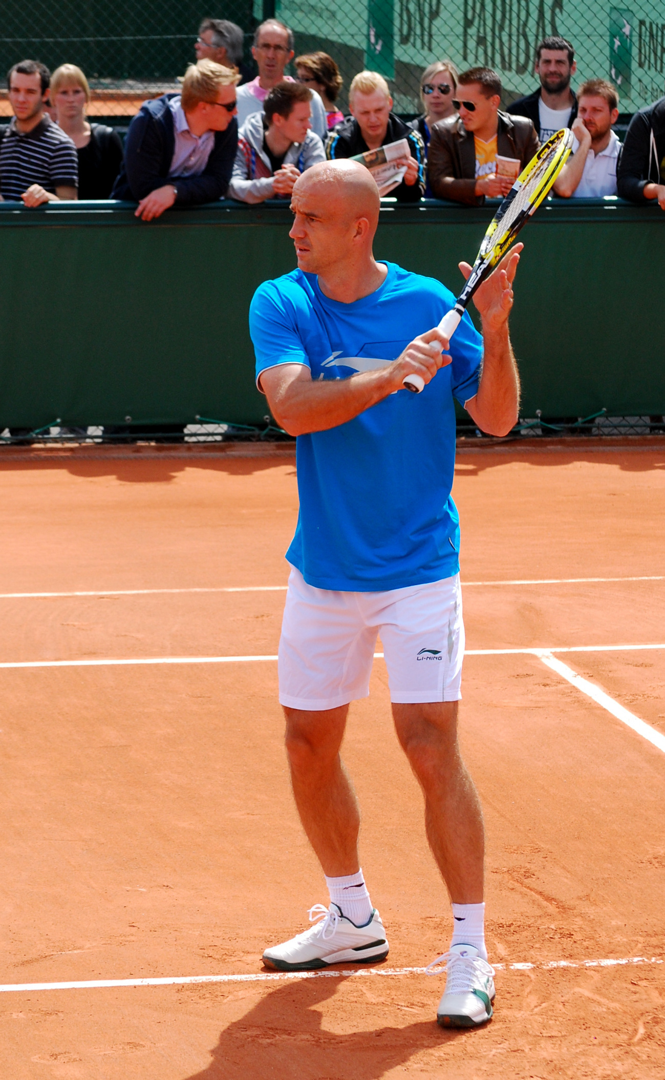 Roland Garros 2011.